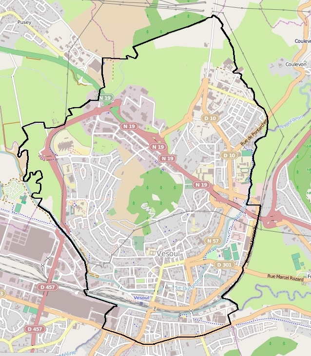 Carte de Vesoul